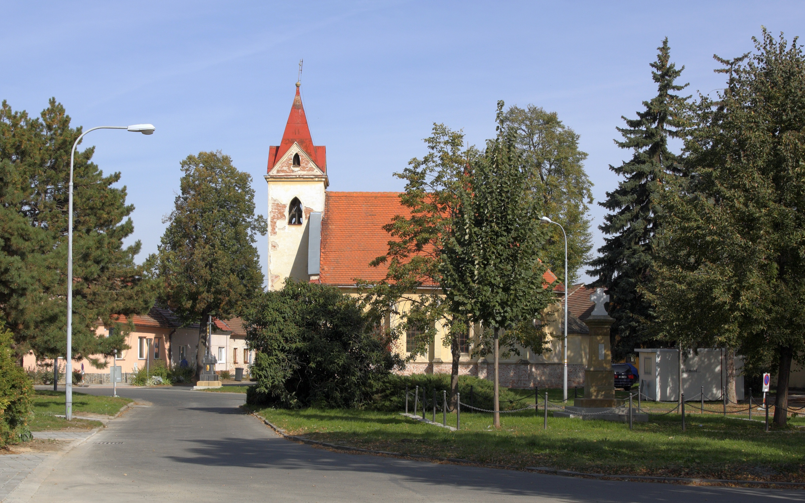 Přízřenice - Staré náměstí, pohled od jihu.